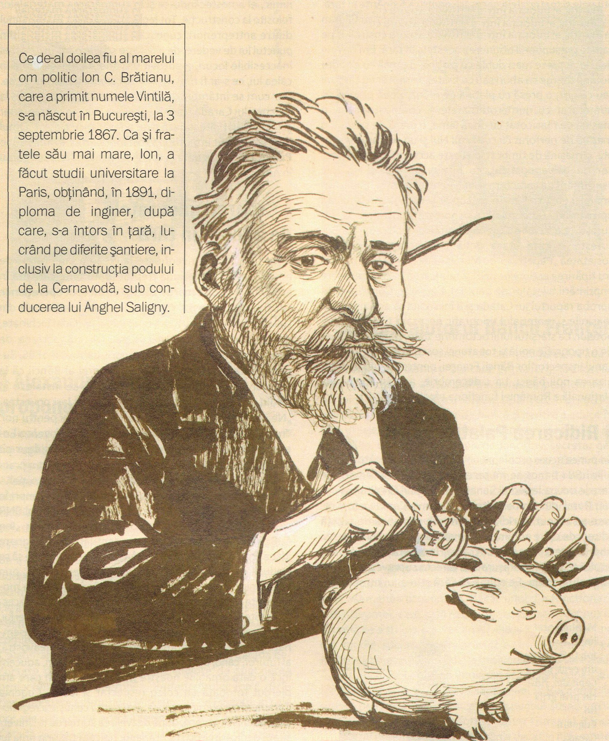 Caricatură din perioada 1922-1926 prezentându-l pe Vintilă Brătianu ca ministru de finanţe